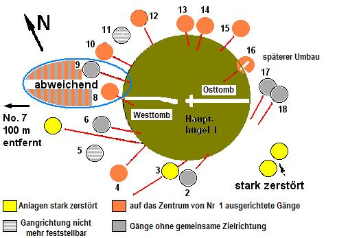 Knowth